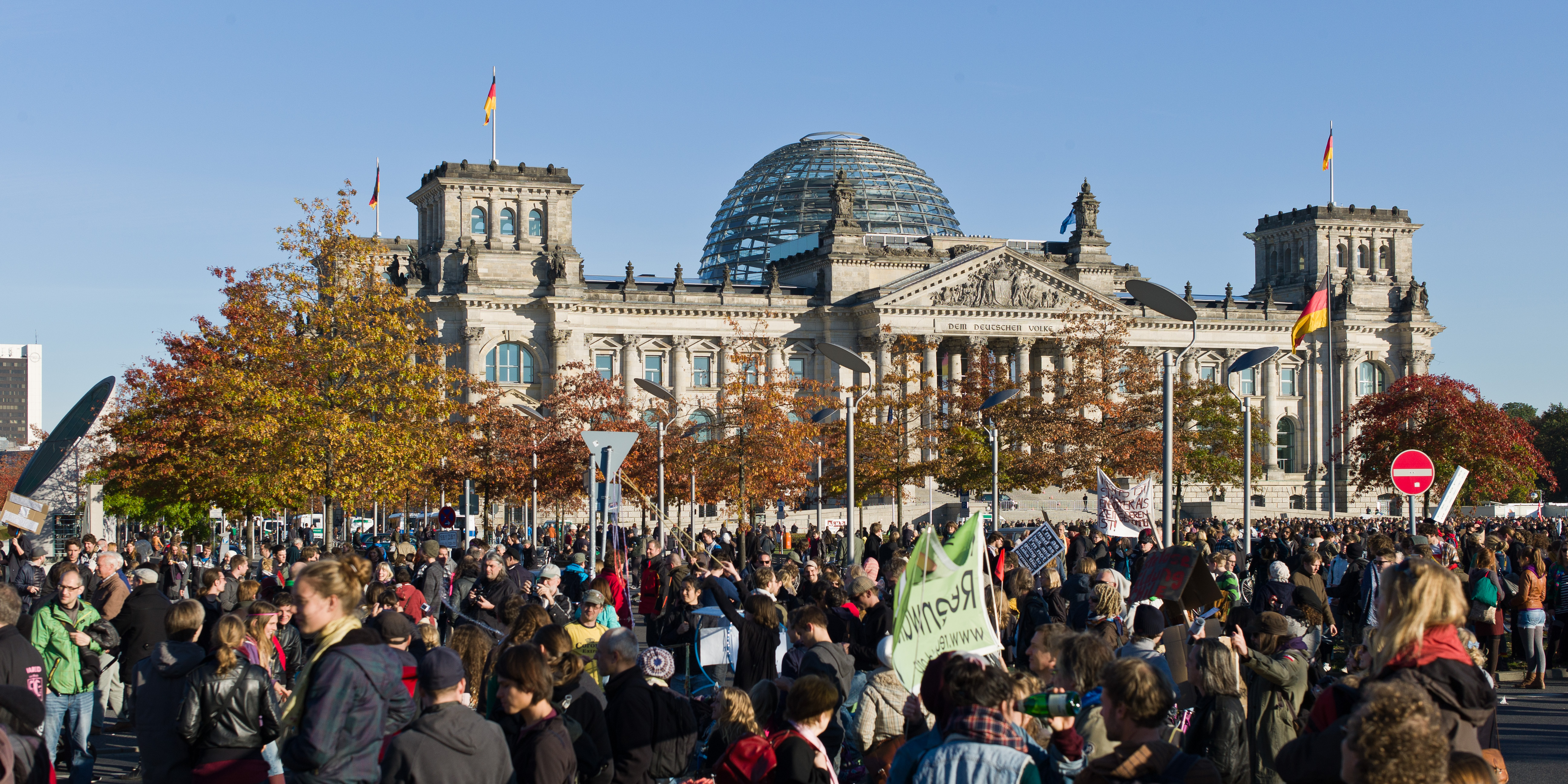 Occupy Berlin, Reichstag, Berlin, Germany.